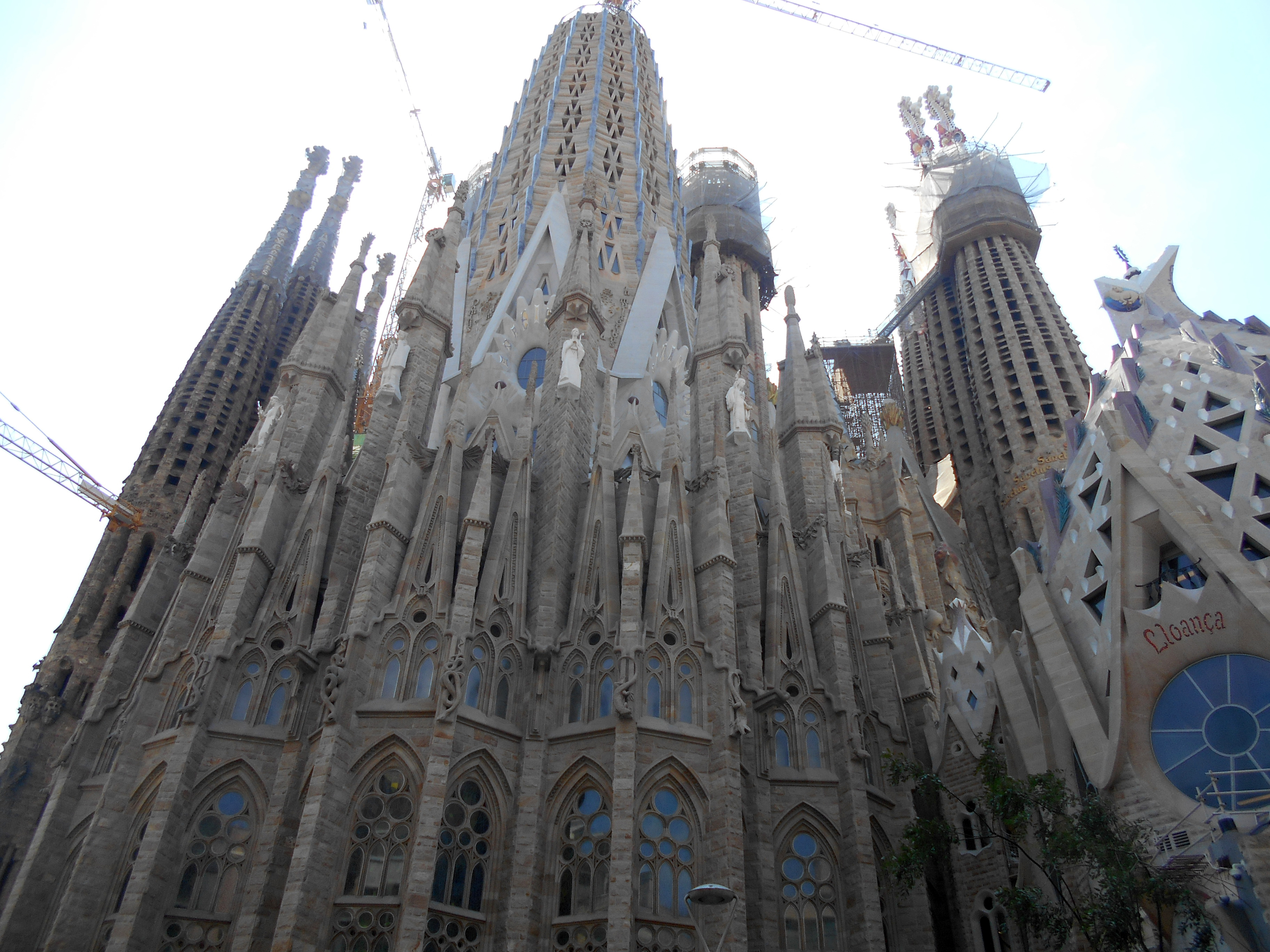 Ábside.